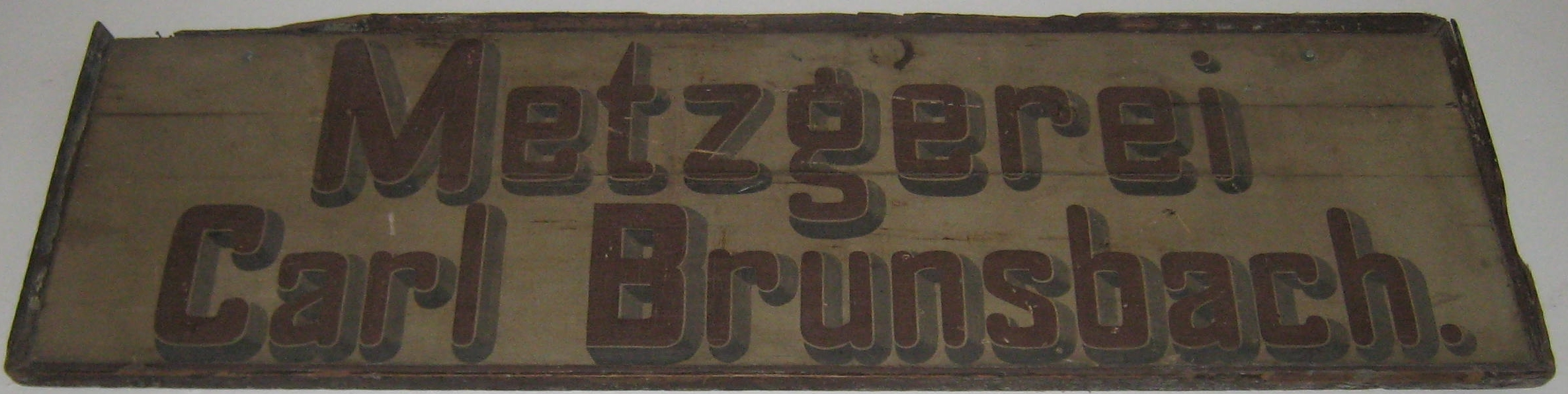 Altes Metzgereischild im denkmalgeschützten Haus Horpestraße 4 in Engelskirchen